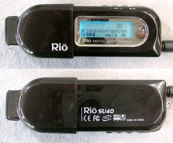 Rio_su40.Digital audio player